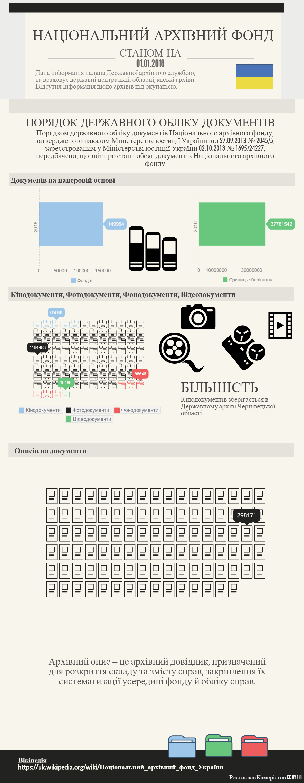 Інфографіка НАФу.